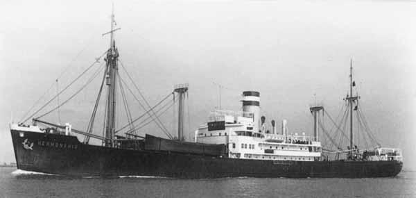 Das Kombischiff HERMONTHIS der Hapag des Deutschen Westküstendienstes